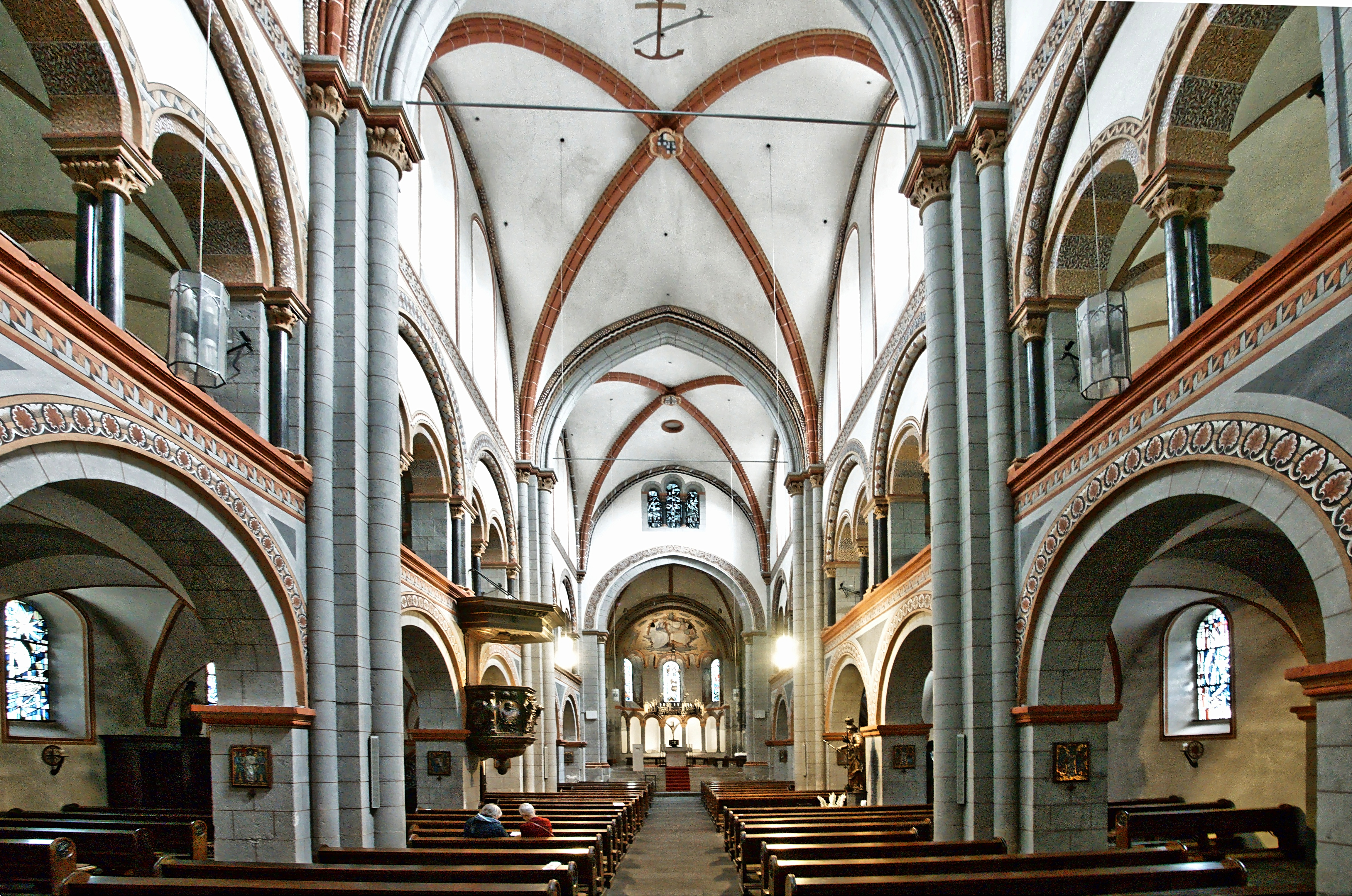 Katholische Kirche Maria Himmelfahrt in Andernach - Blick zum Altar